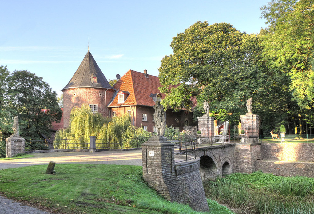 Schloss Hueth in Rees-Bienen